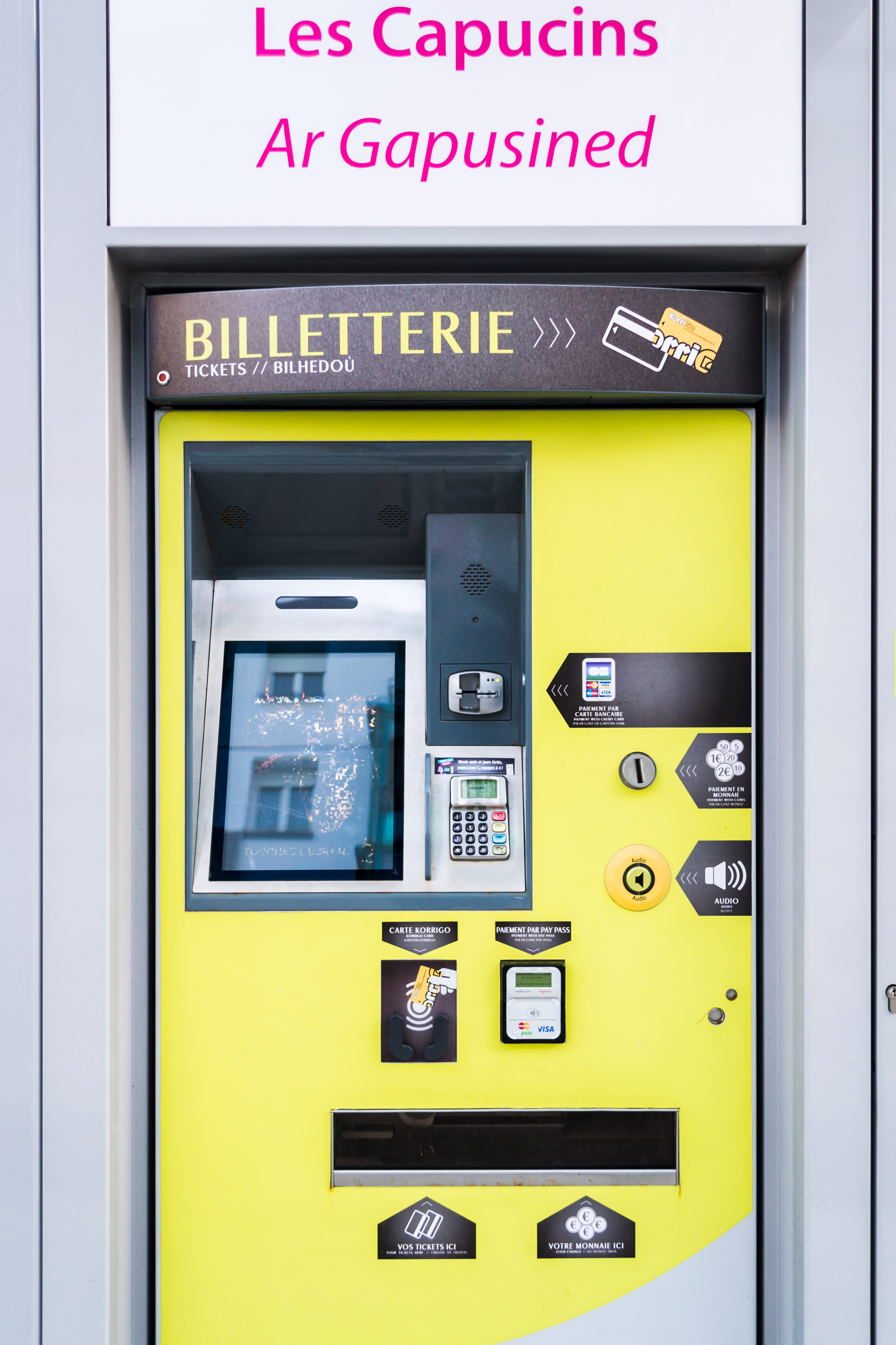 Distributeur automatique Bibus de la station de Tram Les Capucins à Brest.